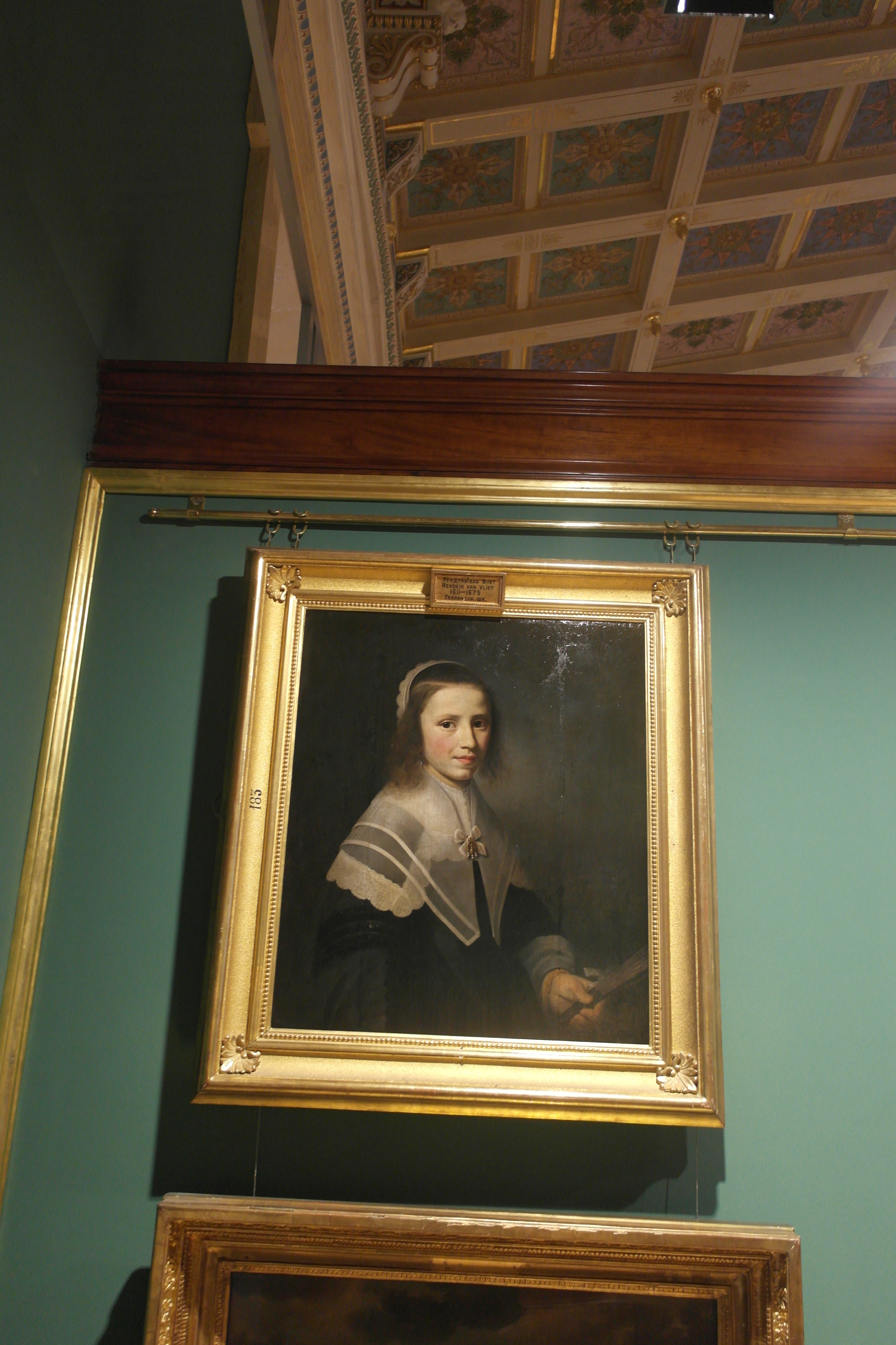 Новый Эрмитаж, зал 249 - Картина Хендрика ван дер Влита "Портрет девушки"